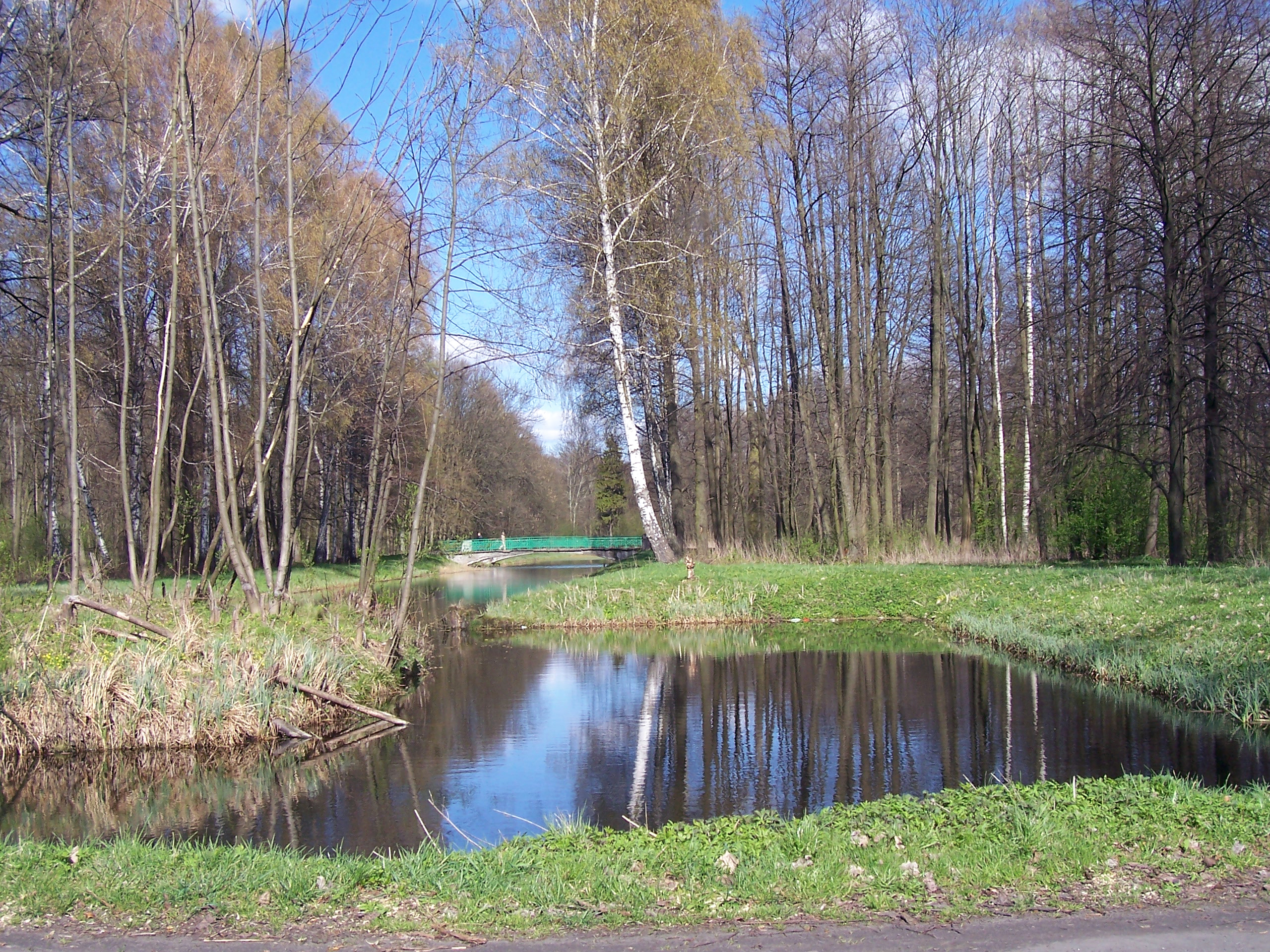 Choroszcz - park pałacowy w zespole pałacowym Branickich (zabytek nr A-30 z 24.09.2002 i 42 (48) z 22.03.1956)